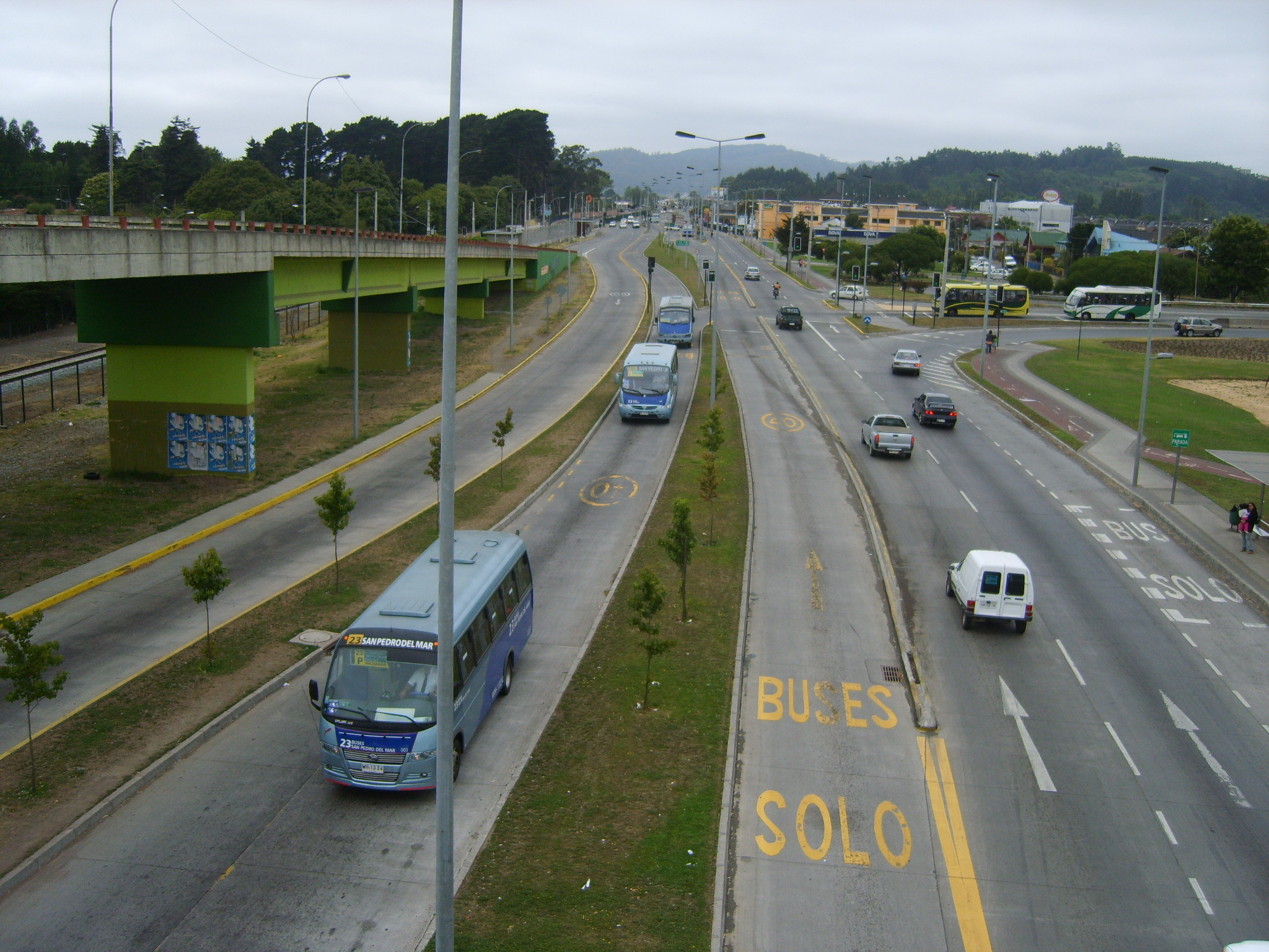 Avenida Pedro Aguirre Cerda en San Pedro de la Paz.